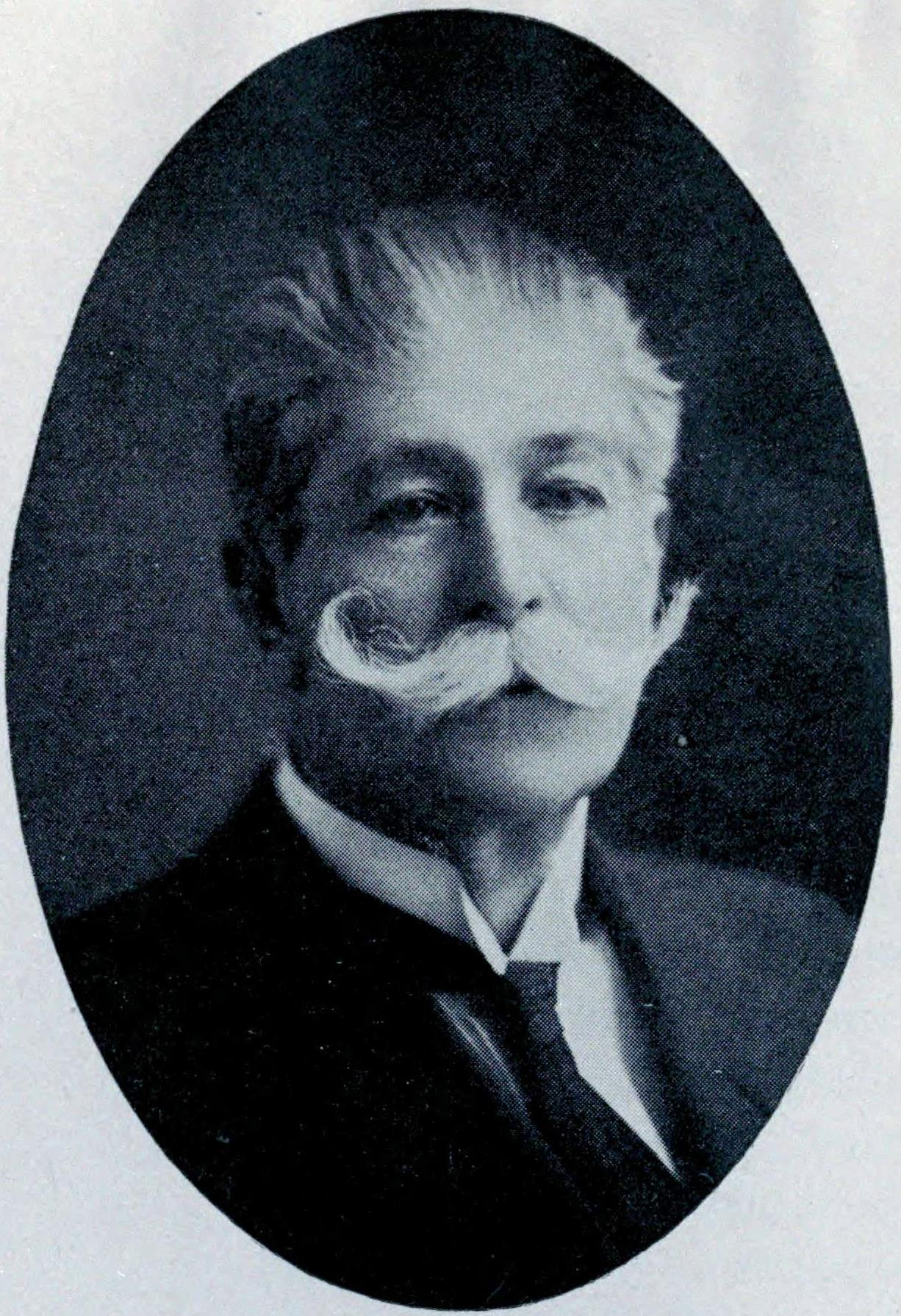 Anselmo Blanlot Holley (La Serena, 1860 - Santiago, 23 de octubre de 1920) Abogado y político chileno.